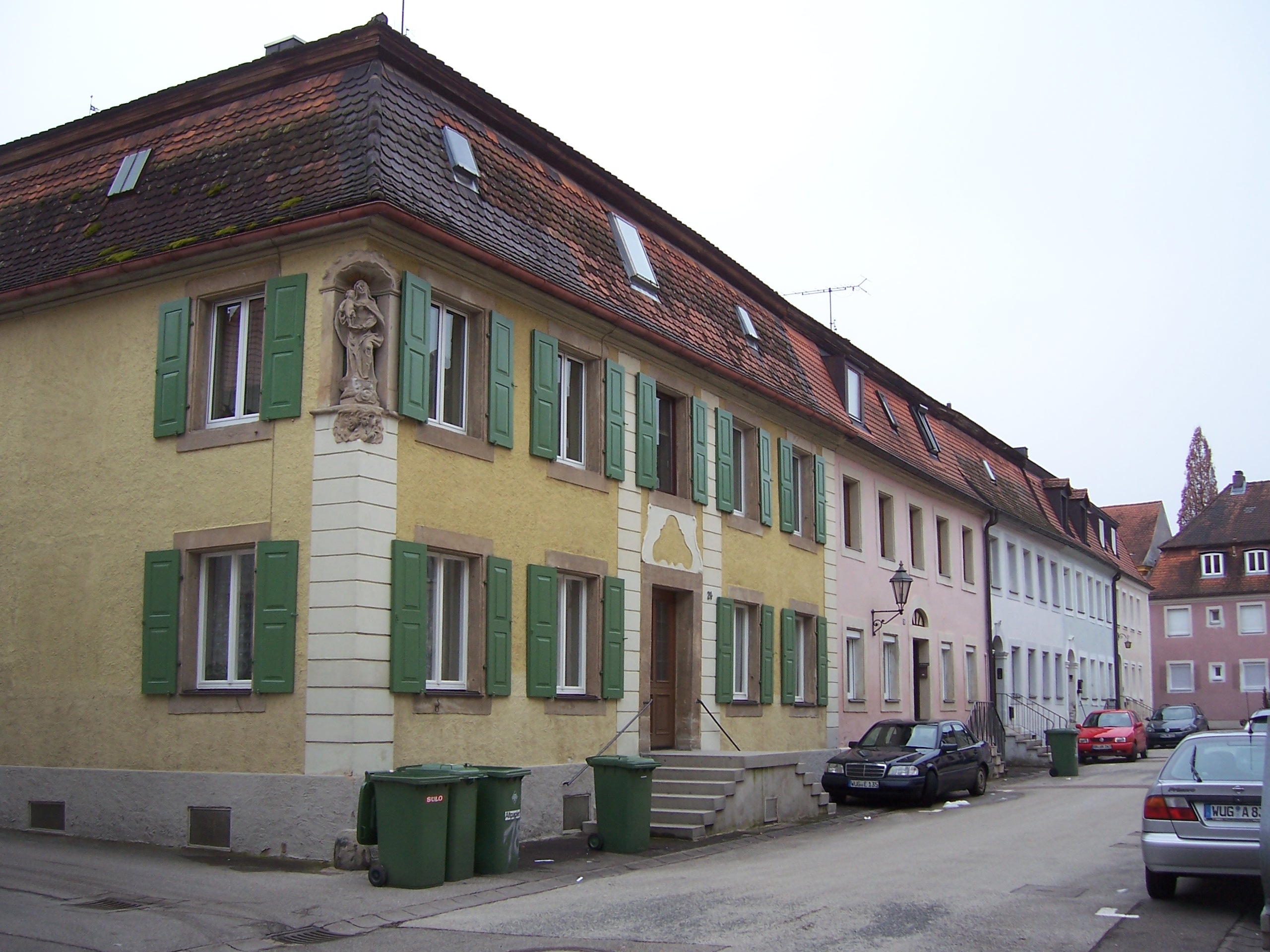 Ellingen Neue Gasse 24